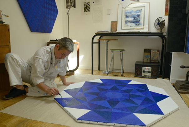 comment l'artiste travaille